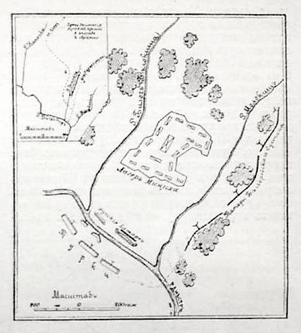 Данное изображение было использовано в статье «Белокиша» опубликованной в пятом томе «Военной энциклопедии», который был издан книгоиздательским товариществом Ивана Дмитриевича Сытина в 1911 году в столице Российской империи городе Санкт-Петербурге.